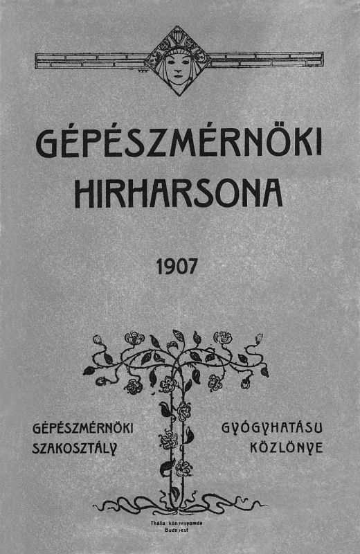 A Gépészmérnöki Hírharsona előoldala.